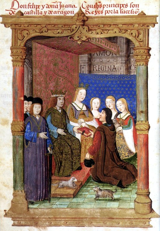 Imagen del Rimado de la Conquista de Granada